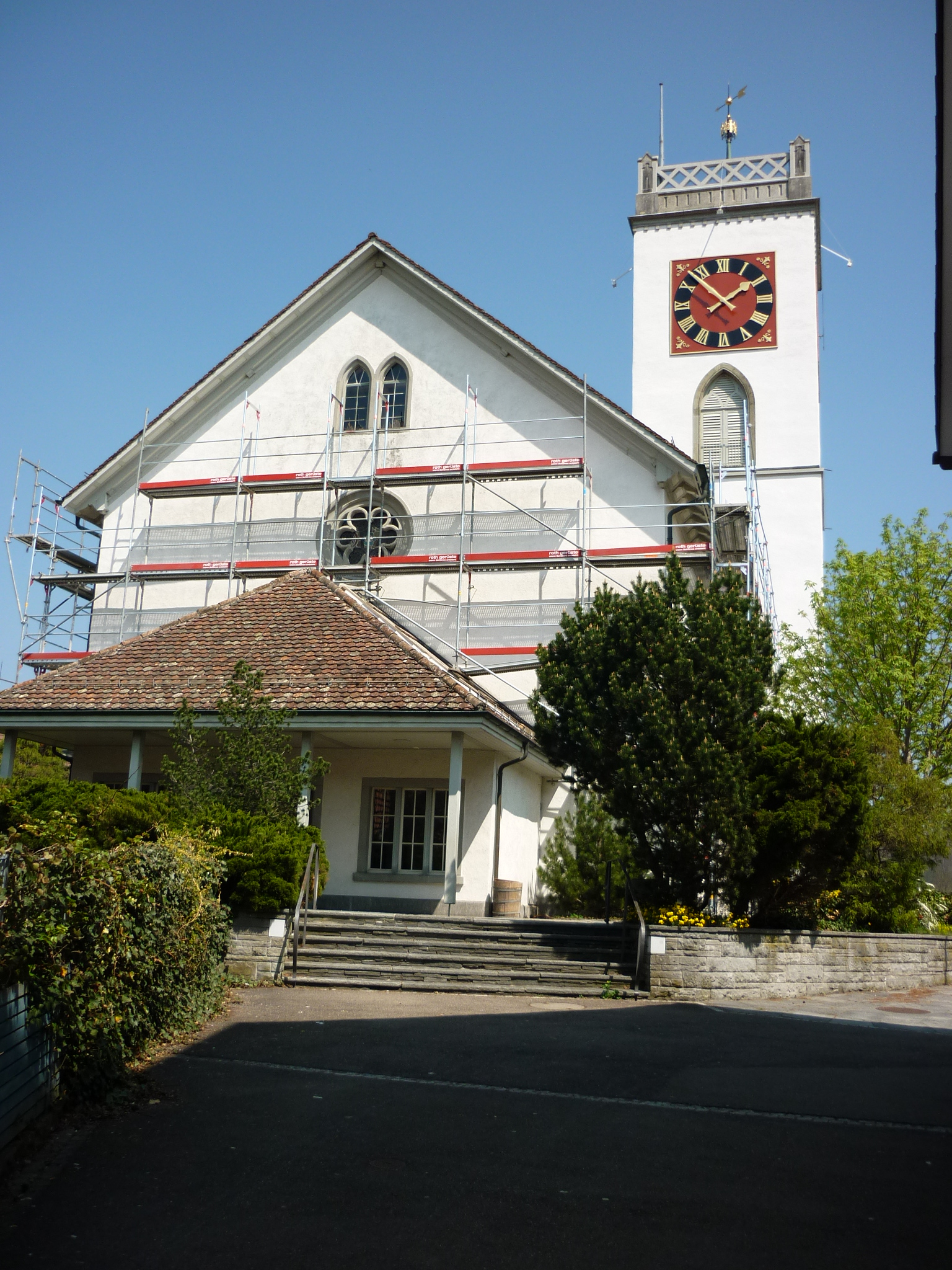 Reformierte Kirche Neftenbach ZH, Schweiz